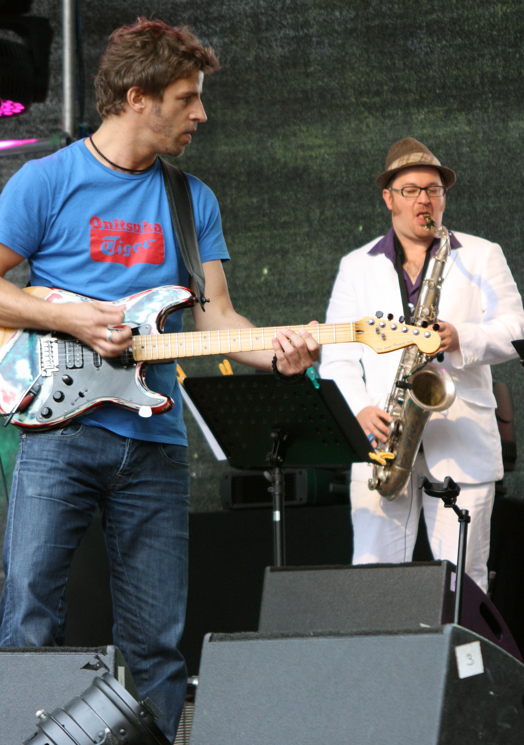 Roland Bürger Künstlername Bürgermeista. Gittarist und Sänger der Band Bürgermeista und die Gemeinderäte. Bürger steht links. Auftritt am Tag der Arbeit am Münchner Marienplatz. Rechts der Saxophonist der Band